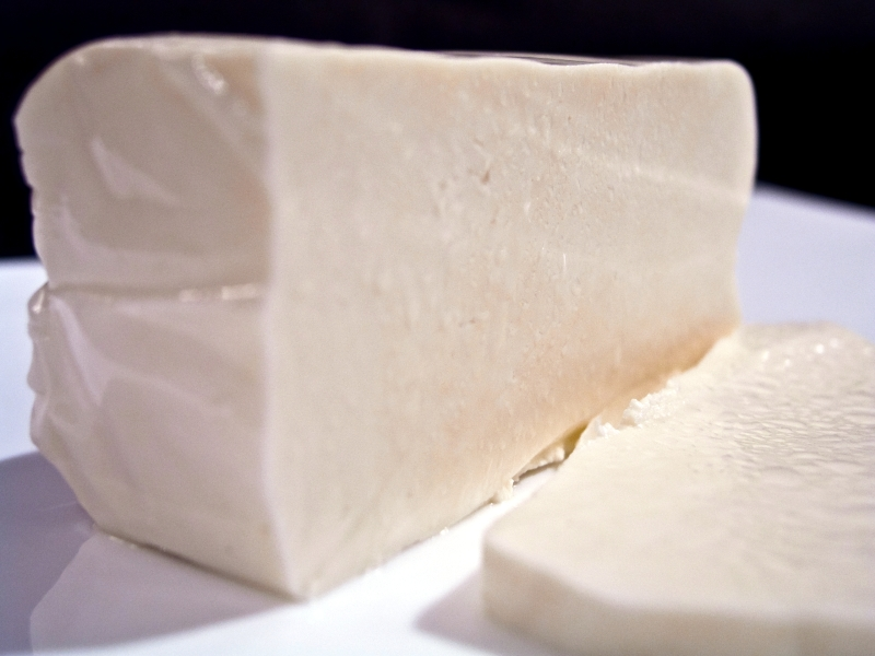 Škripavac iz Otočca, Hrvatska